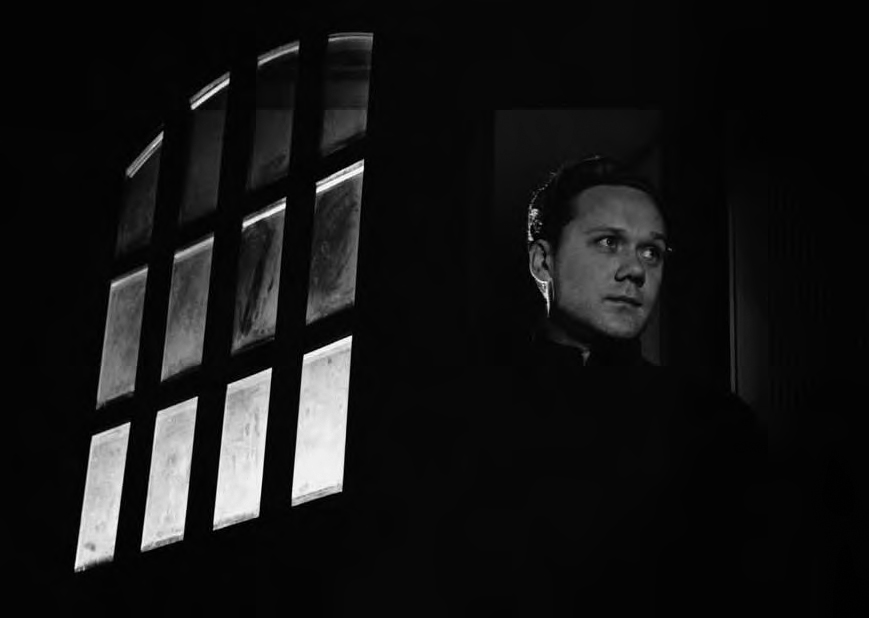 Skådespelaren Olof Thunberg fotograferad i samband med radioserien "Mannen i svart". Datum enligt SVT Bild ( Bildtext 1999: "Skådespelaren Olof Thunberg var skräckinjagande uppläsare i serien Mannen i svart, producerad av Torsten Jungstedt. foto: Jarl Ekenryd/SVT Bild"